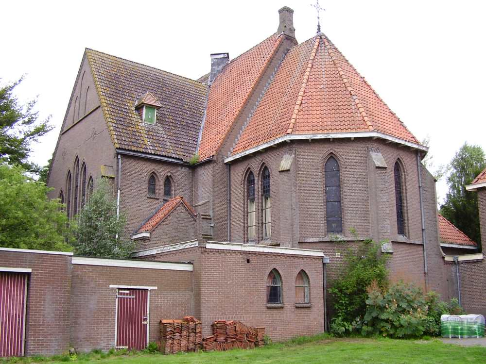 De Oude Antoniuskerk te Zwartemeer.